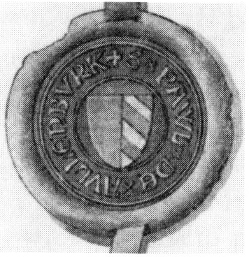 Pečeť Pavlíka ze Sovince